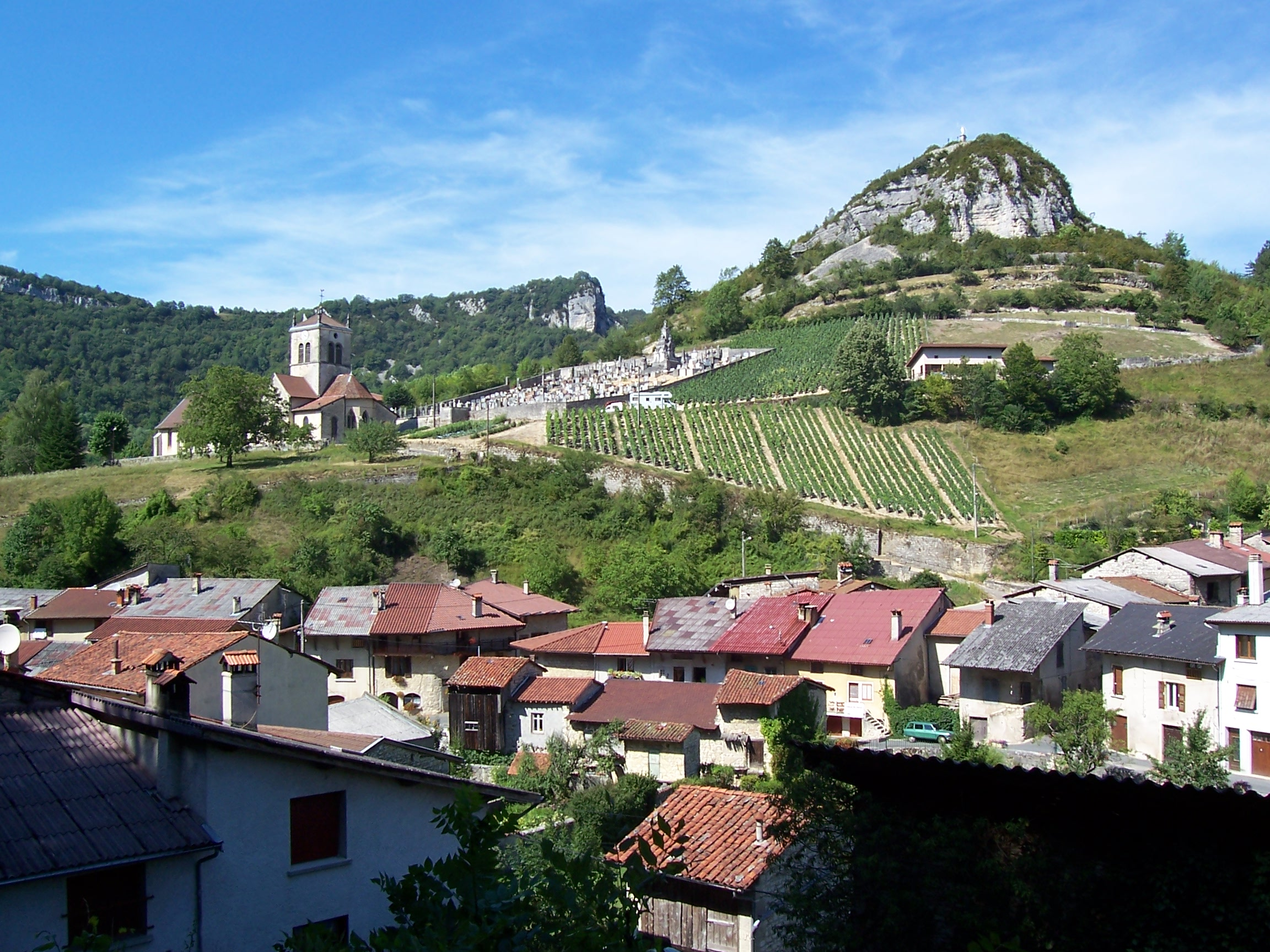 Cerdon dans l'Ain, France.